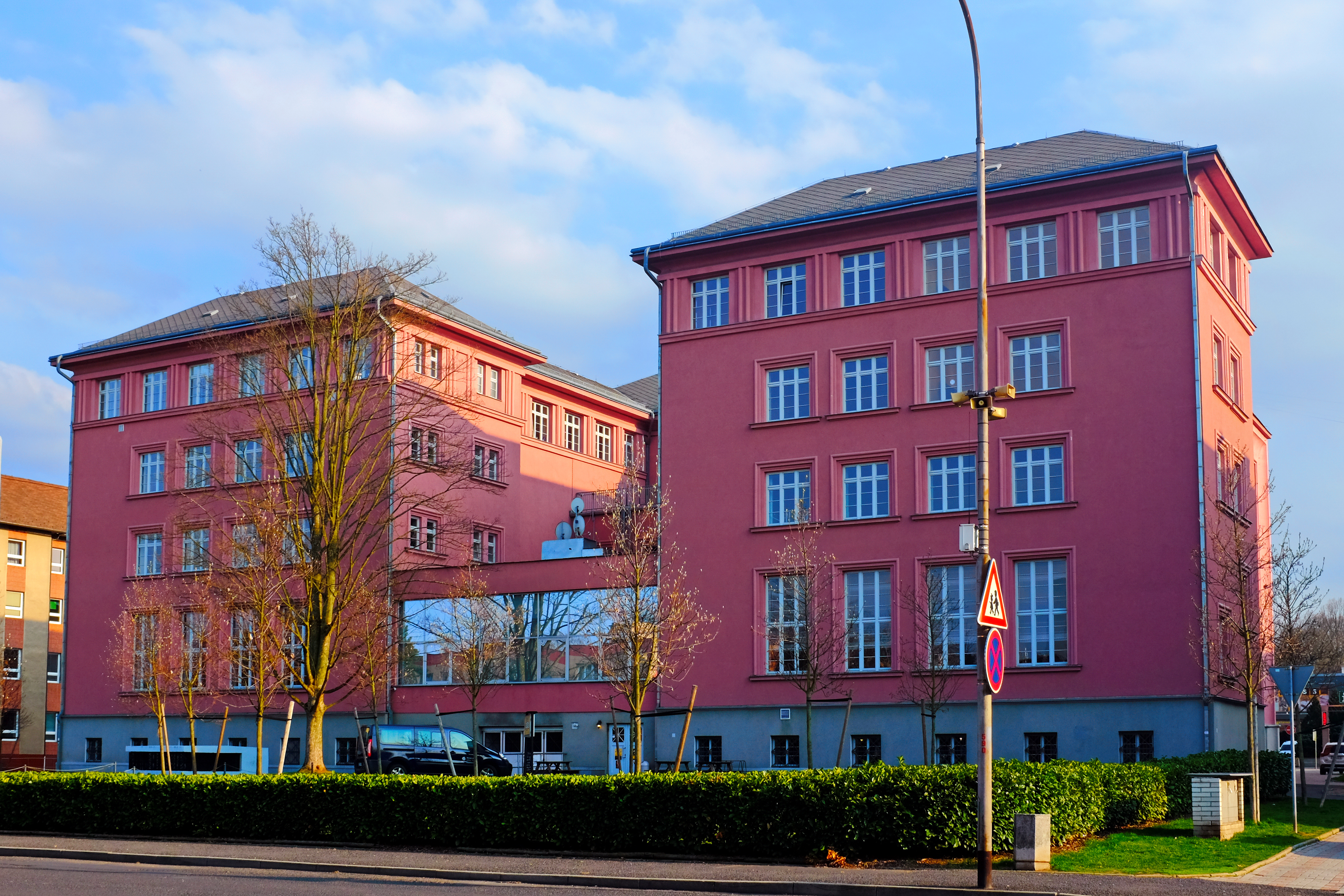 Hornický dům, náměstí Budovatelů, ul. 5. května 655, Sokolov.